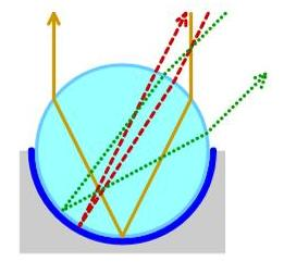 Werking retroreflecterende bol